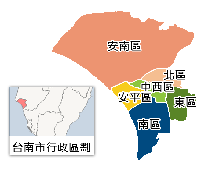 臺灣省臺南市行政區劃。